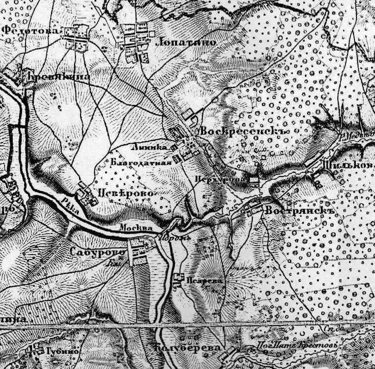 Воскресенск на Топографической карте Московской губернии. (2 версты в дюйме)